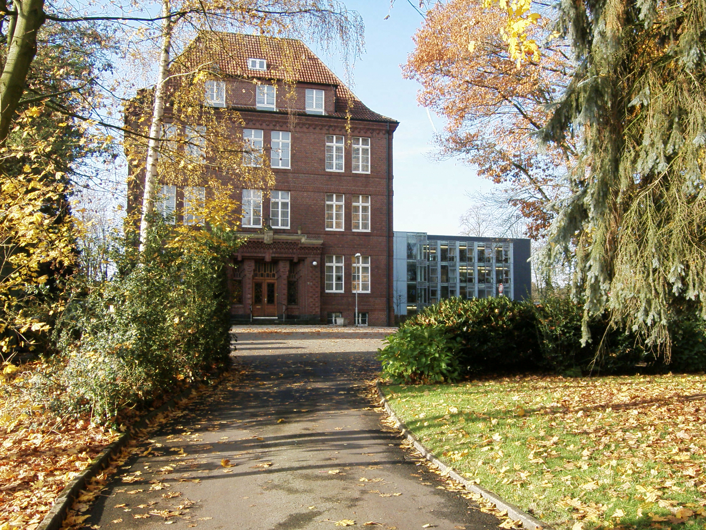 In der Mitte der Haupteingang des ursprünglichen Missionshaus. Rechts, der Eingangsbereich zur Schule (AJG).